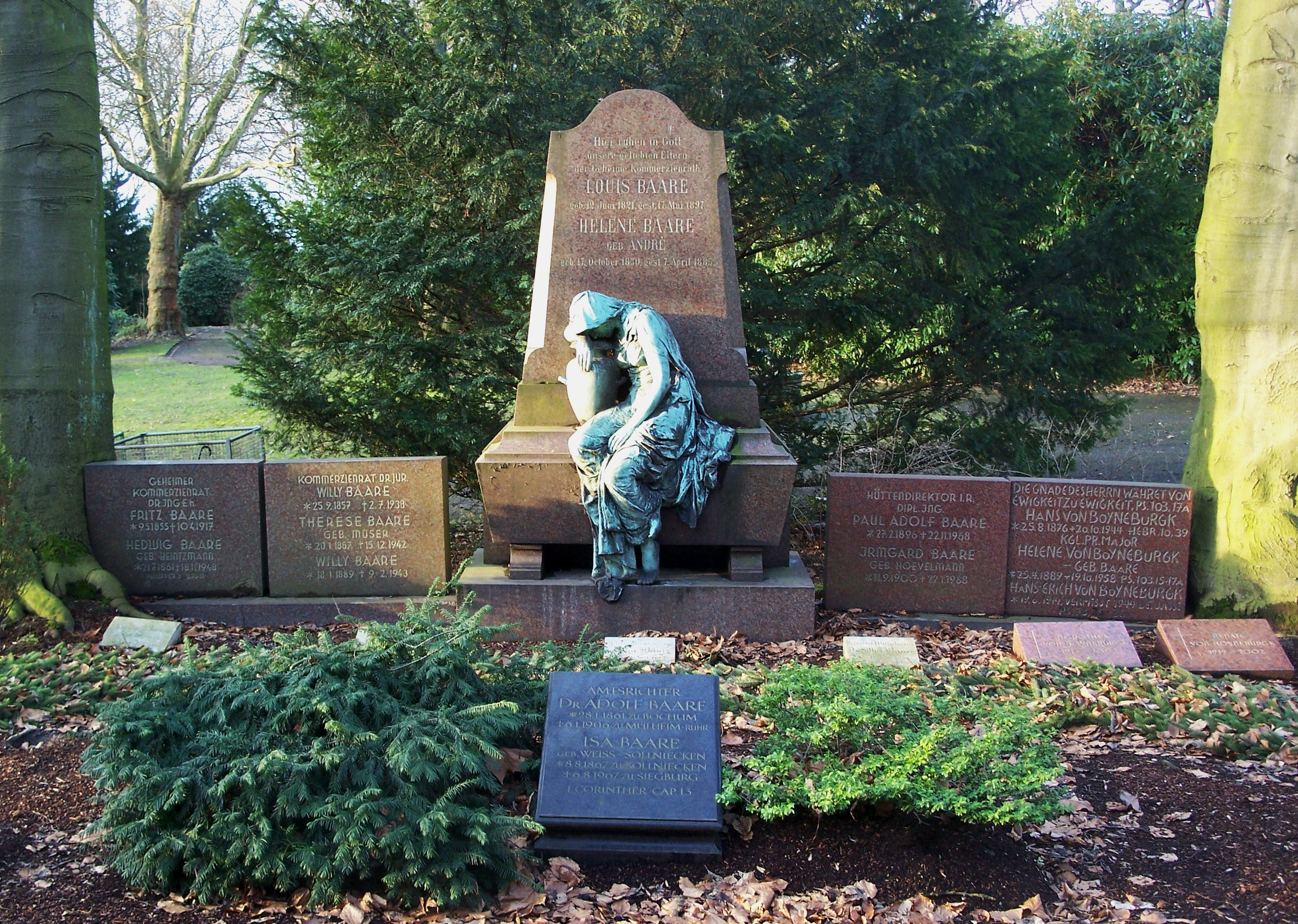 Familiengruft der Familie Baare Louis Baare, Fritz Baare, Willy Baare im Kortumpark Bochum